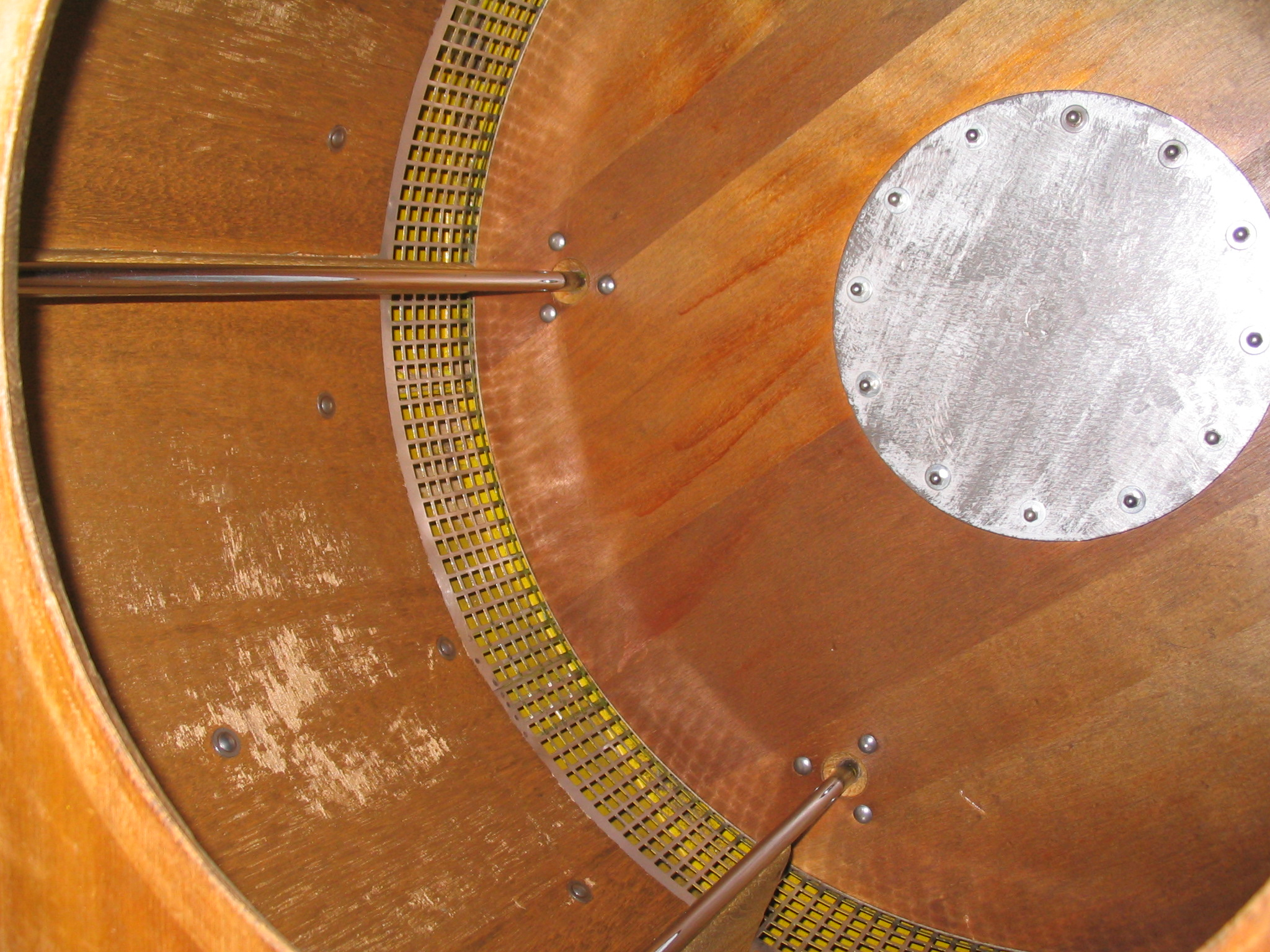 Blick in die Pelz-Läutertonne bei geöffnetem Schüttelsieb. Hersteller Maschinen - Ofenbau Hindenlang, Lobbach b. Heidelberg. Typ 310 LSF, Baujahr 1988 gesehen in der Firma Lederreinigung Dieter, Höninger Weg 107, 50969 Köln-Zollstock Inhaber: Theodoro Saracino. Lederreinigung, Leder-Möbelreinigung, Lederfärberei, Pelzreinigung